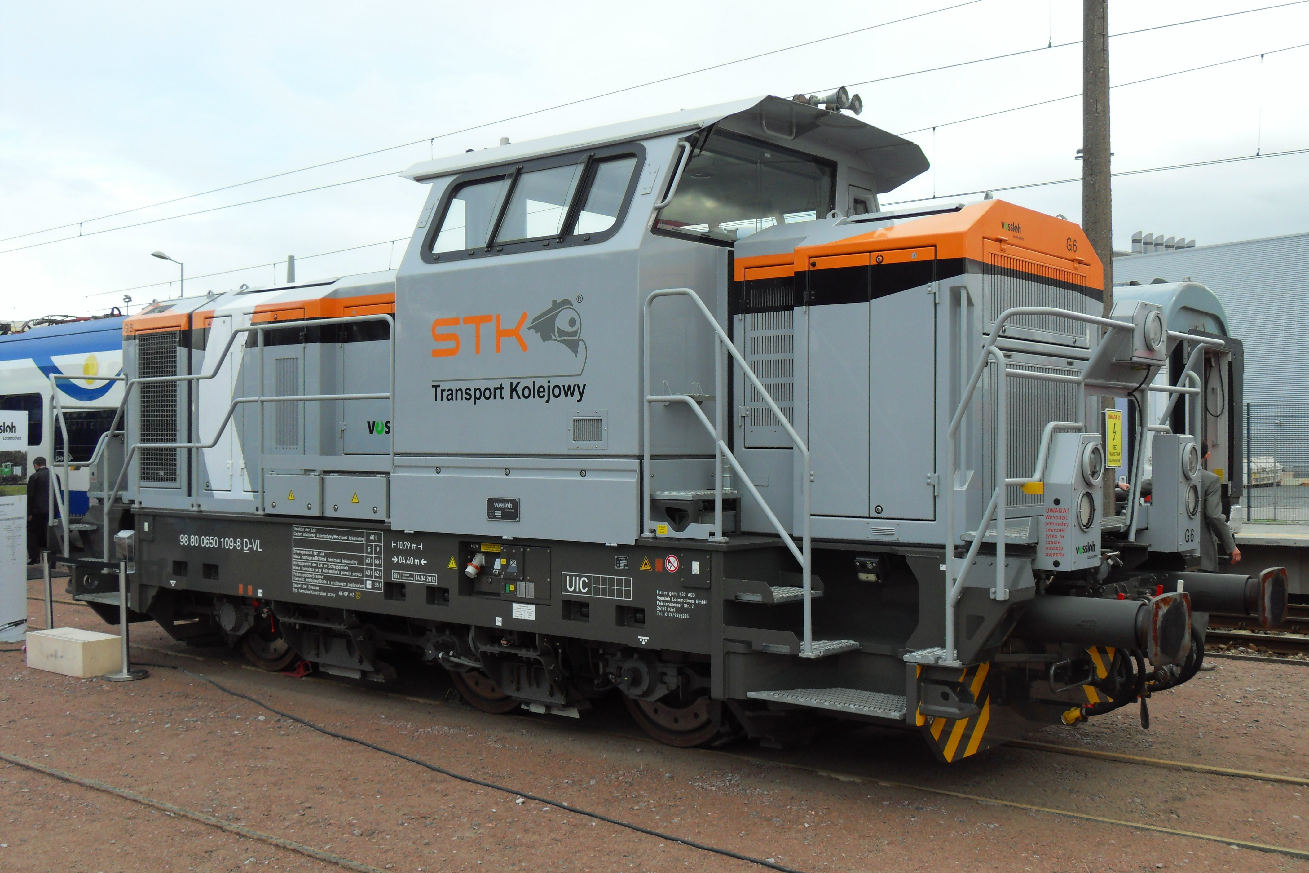 Gdańsk Letnica. TRAKO 2013, Vossloh G 6.